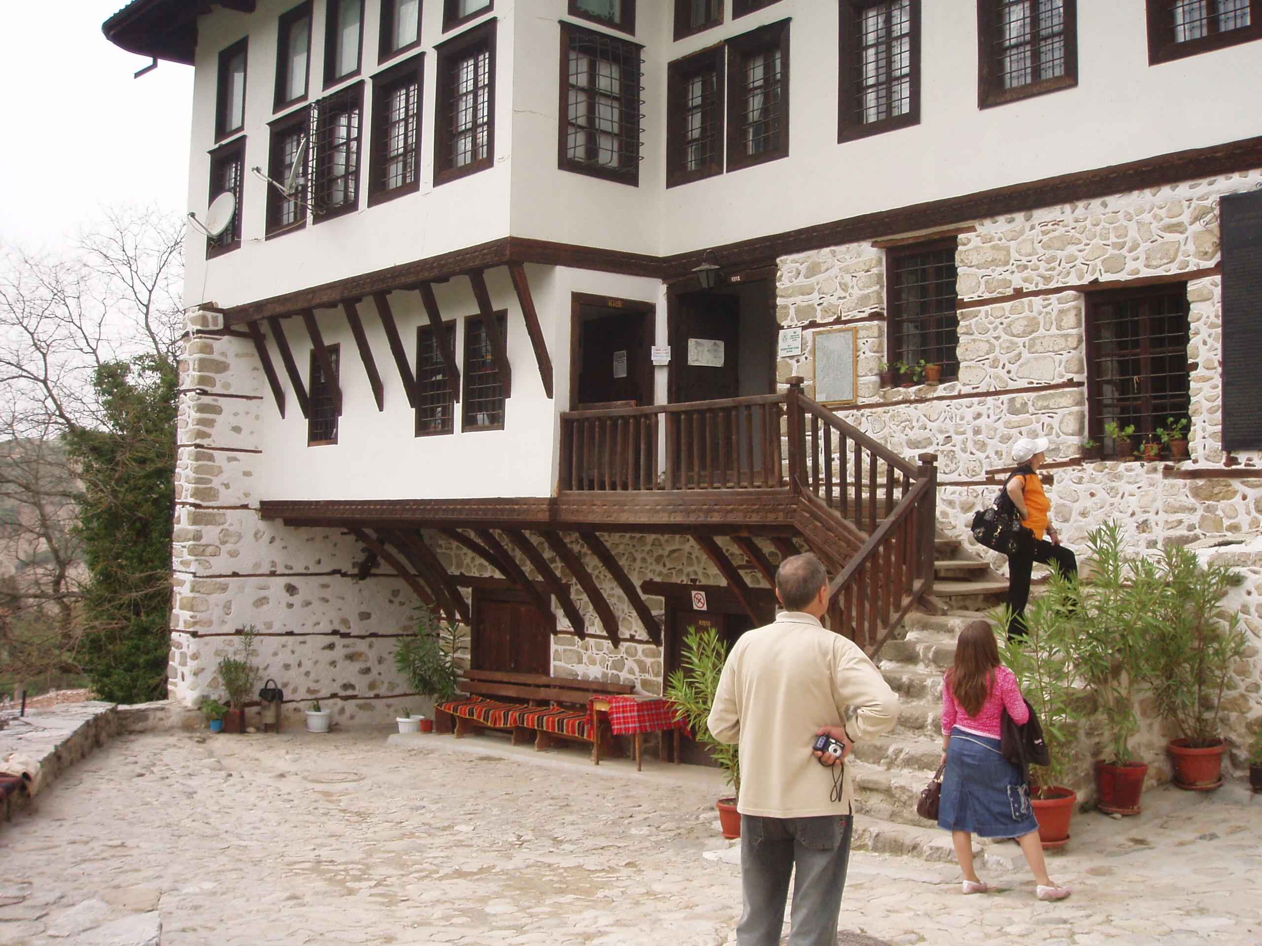 Melnik, Bulgaria